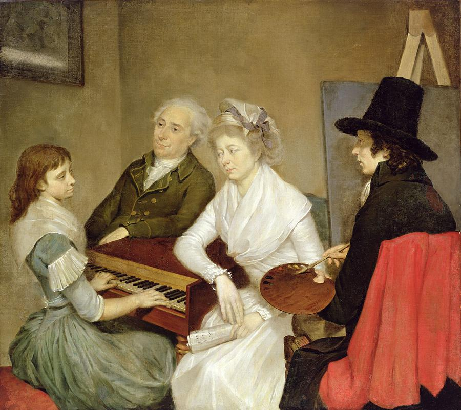 Der Maler und seine Familie